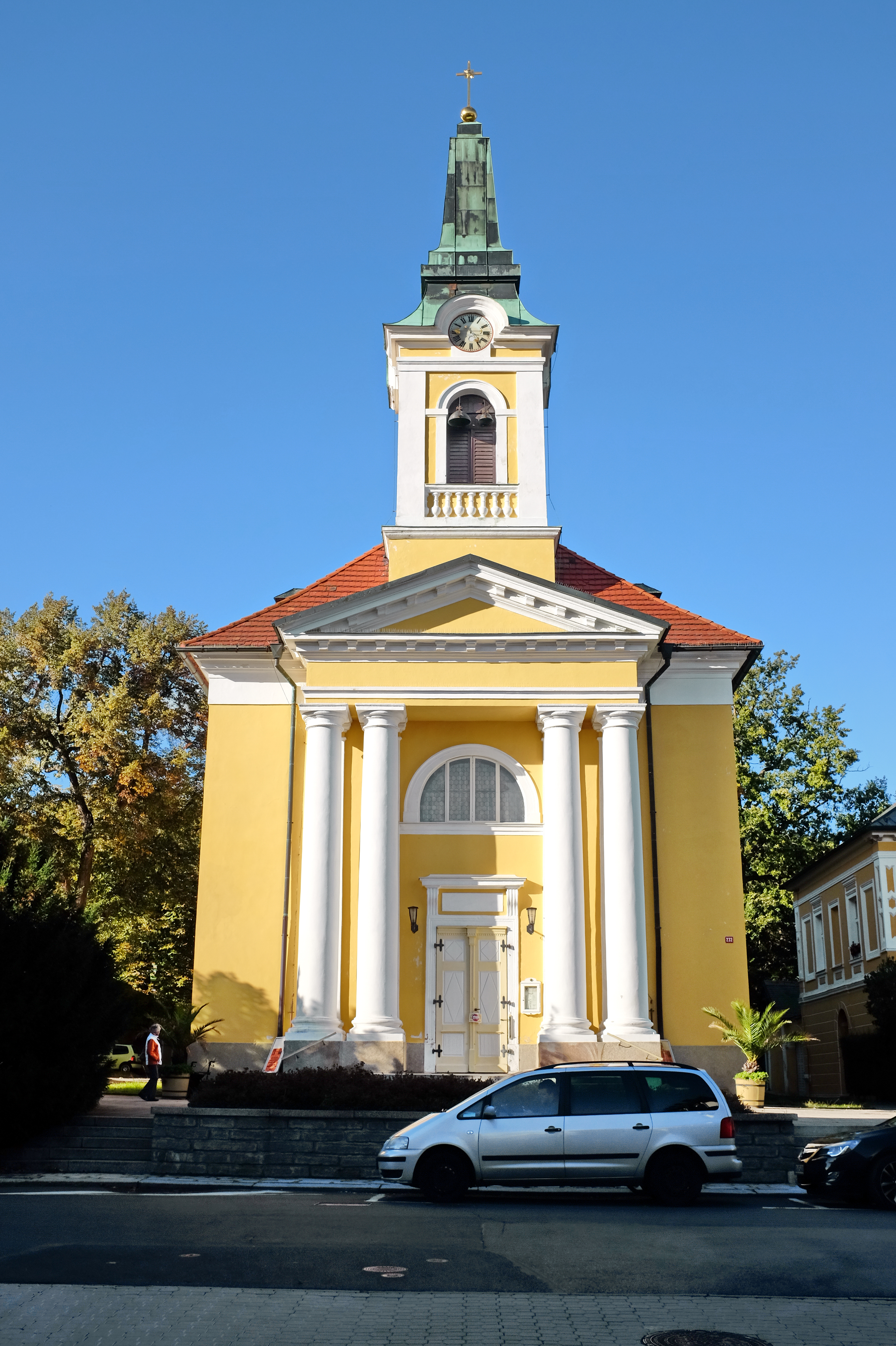 Kostel Povýšení svatého Kříže, Ruská čp. 232, Františkovy Lázně.